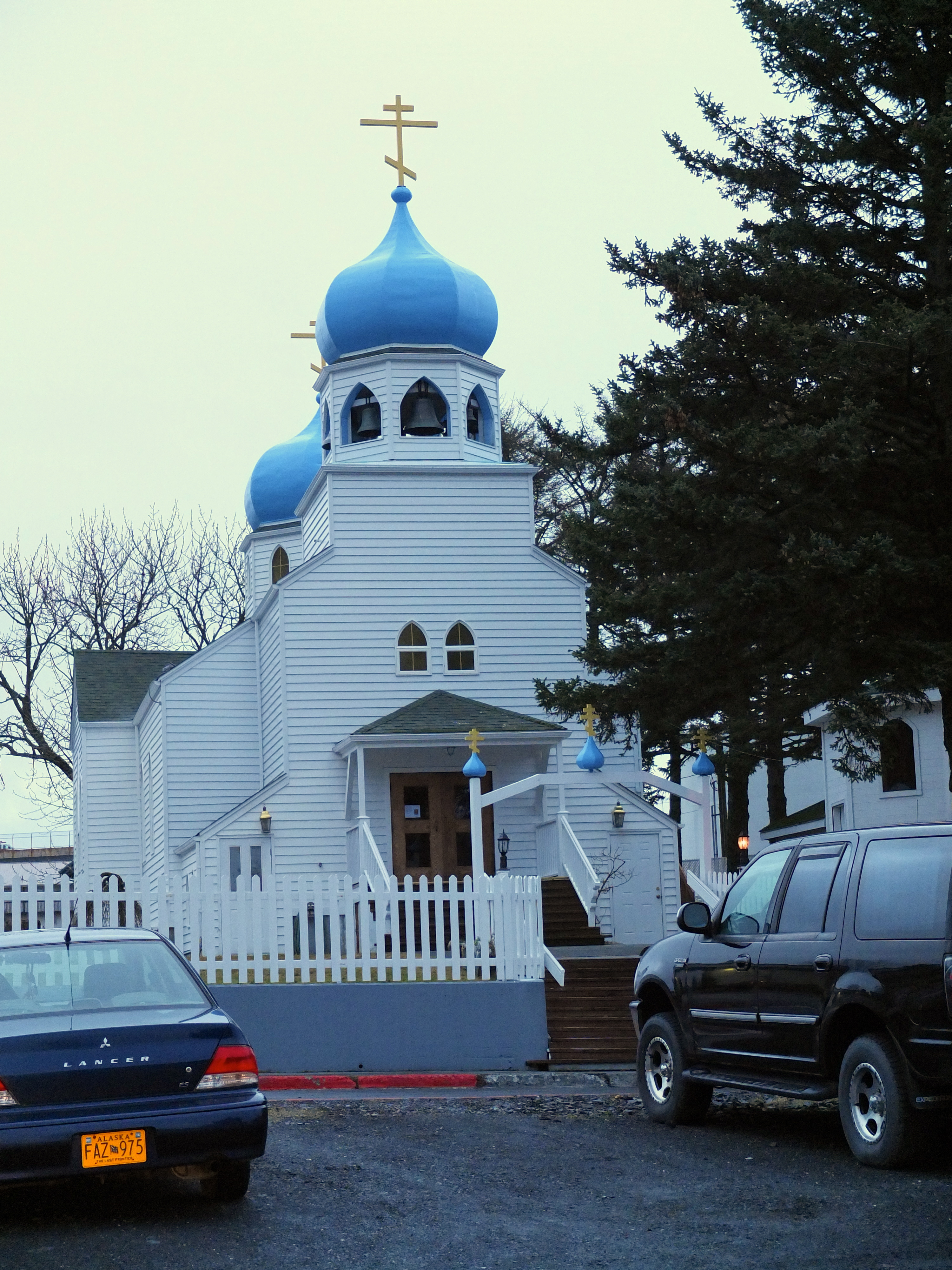 Established 1795, Kodiak